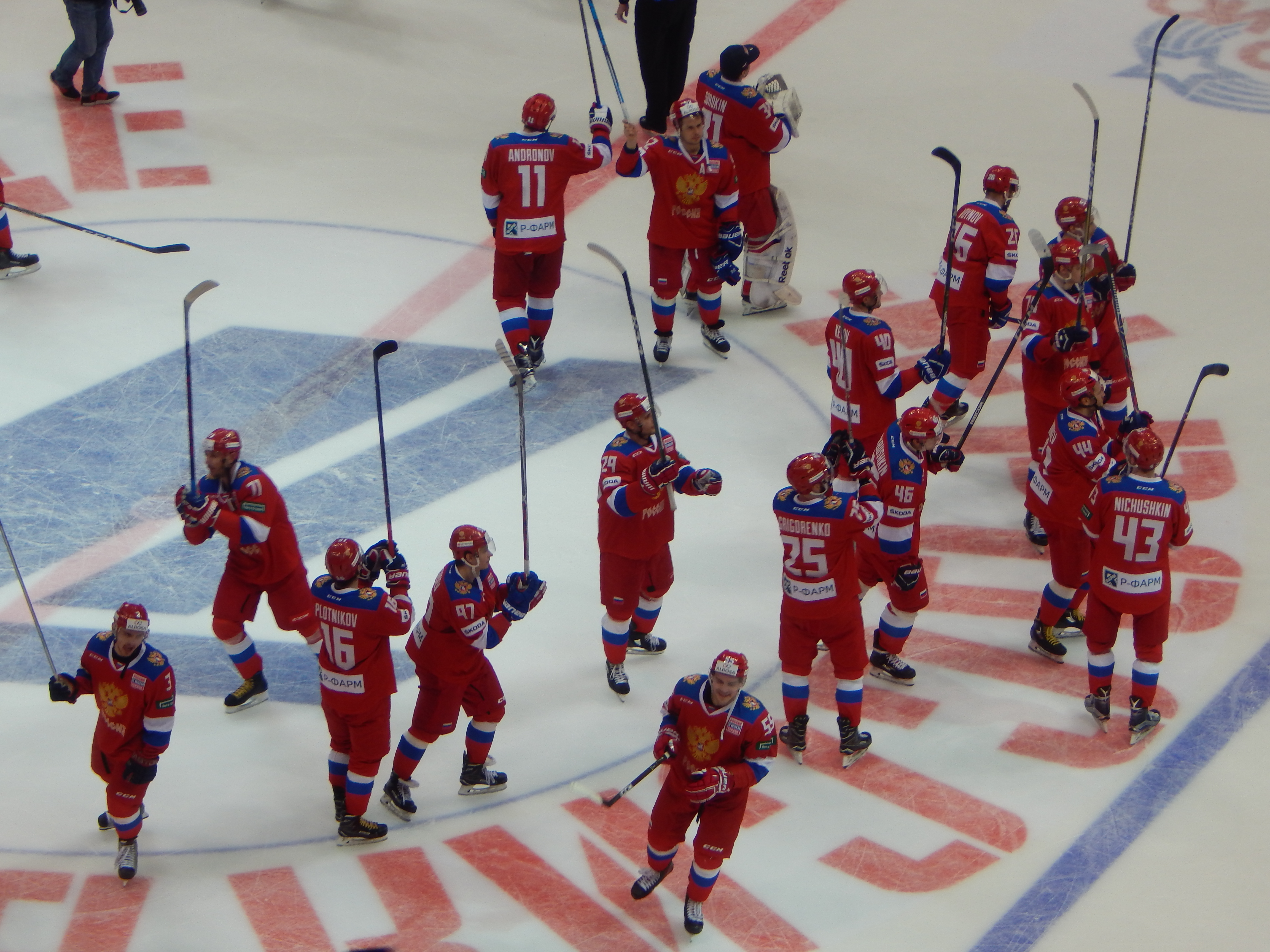 Кубок Первого Канала 2017, матч Россия - Канада (16 декабря 2017)